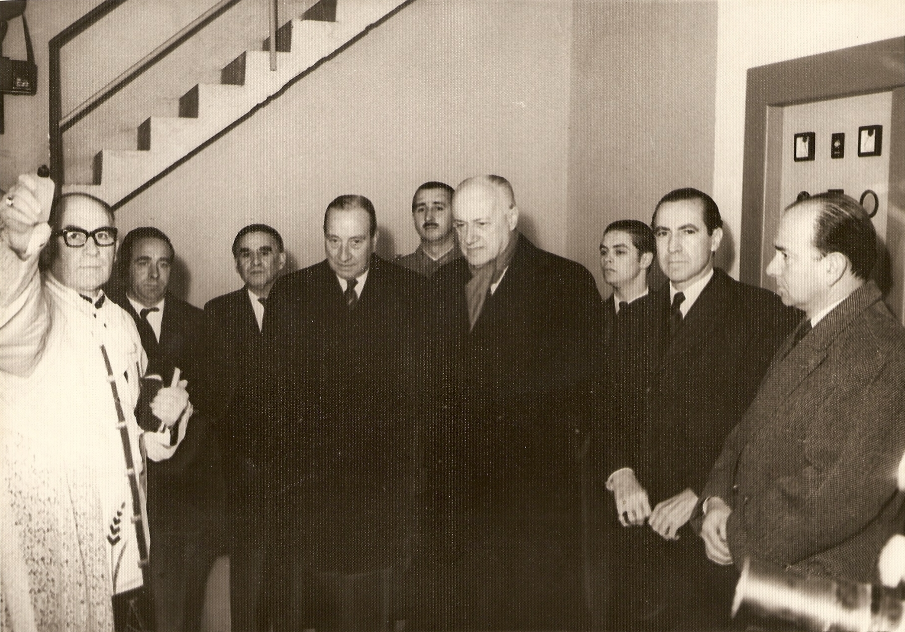 Inauguración del frigorífico de la ECA (Empresa de Comercio Agrícola) donde Carlos Izquierdo Edwards era vicepresidente, acompañado de Jorge Alessandri Rodríguez, Presidente de la República; Manuel Pereira, Ministro de Economía y del Cardenal Raúl Silva Henríquez, según consta en el diario La Unión de Valparaiso del 24 de septiembre de 1963. Agradecimientos: Ana Isabel Izquierdo Berisso